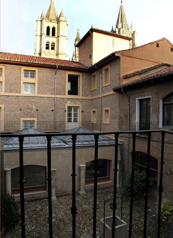 Interior de la Fundación Sierra-Pambley (León, España)